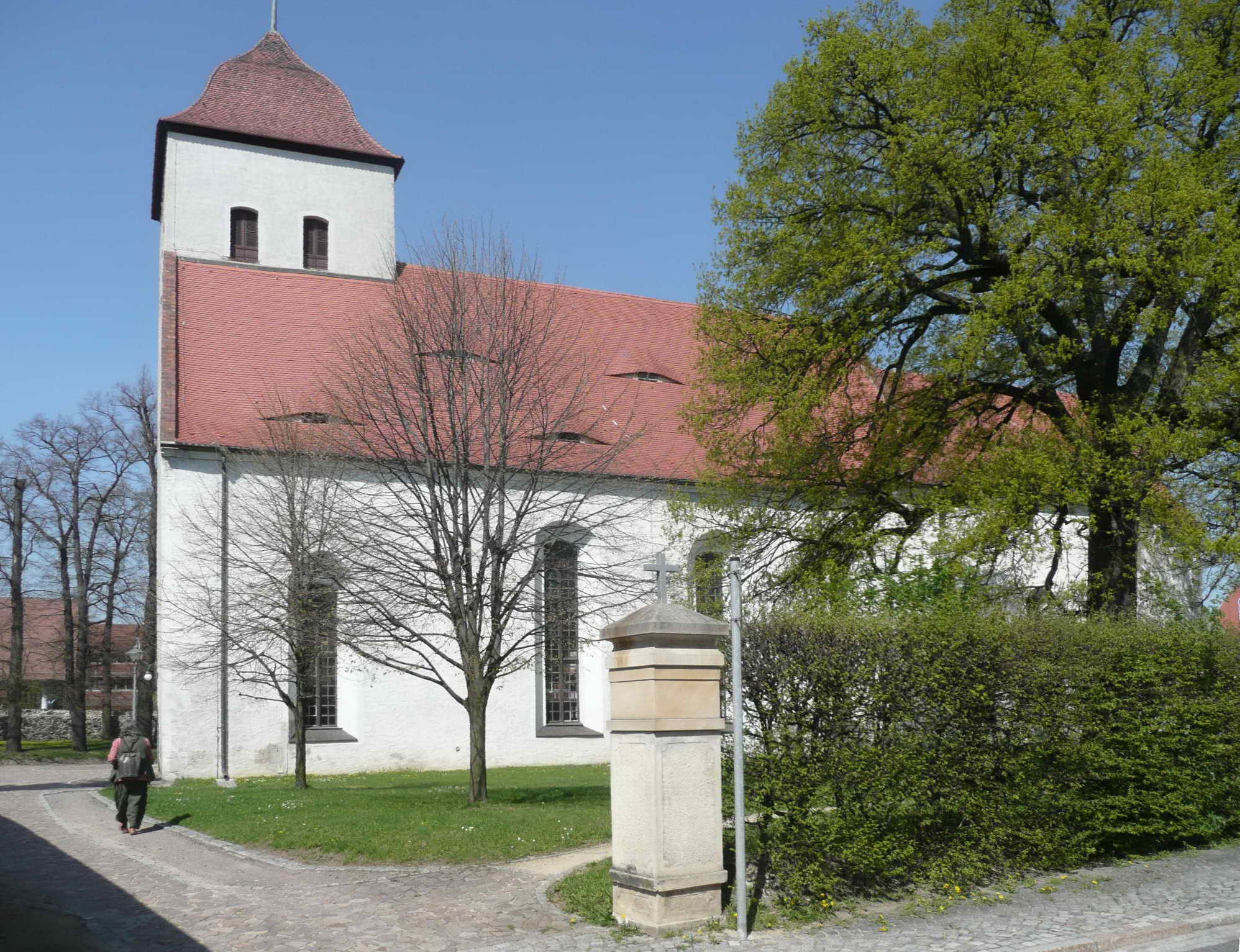 Reichenbach, Kirche St.Johannes 1674, Südseite m Turm